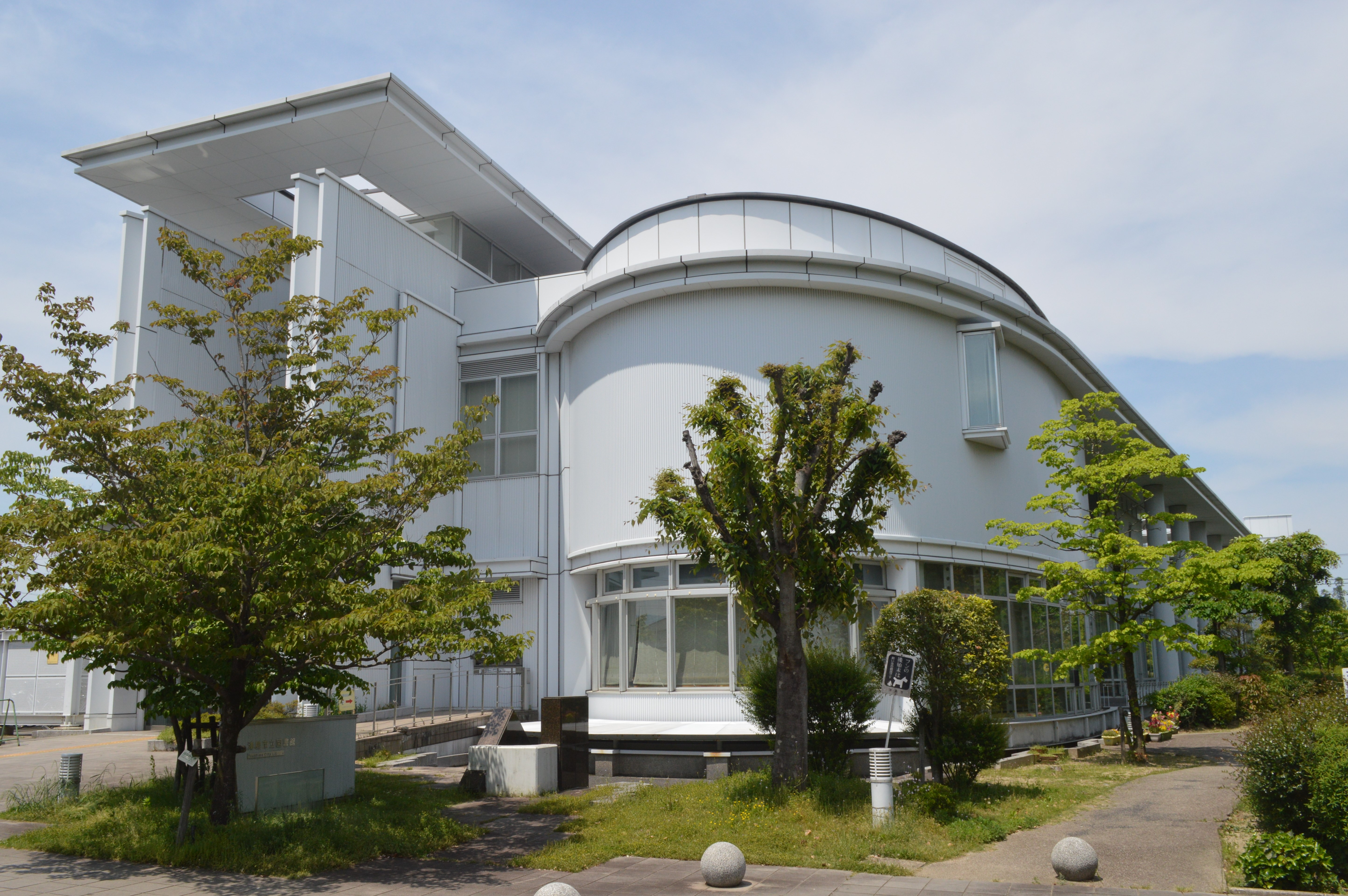 愛知県津島市にある津島市立図書館。